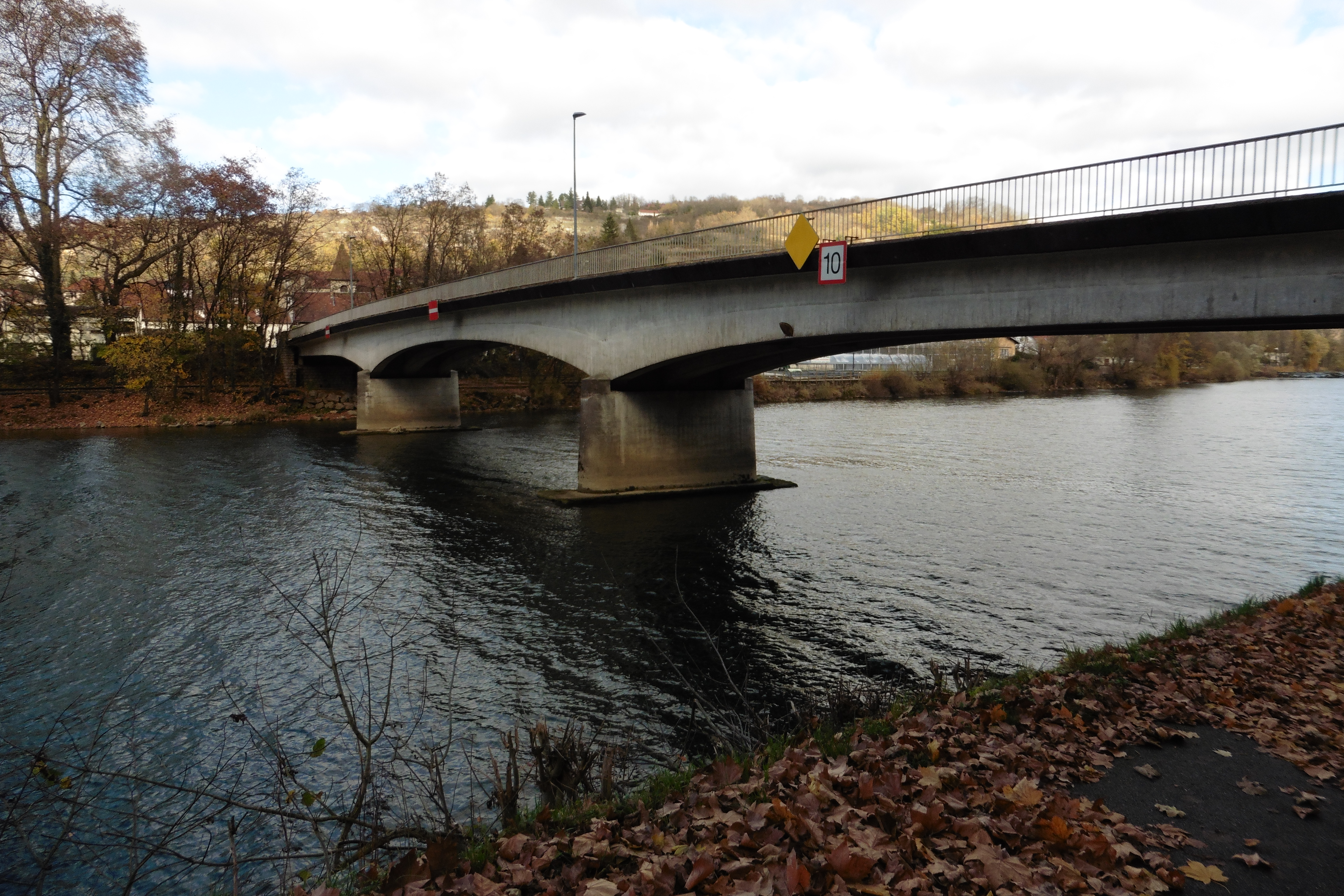 Ponts